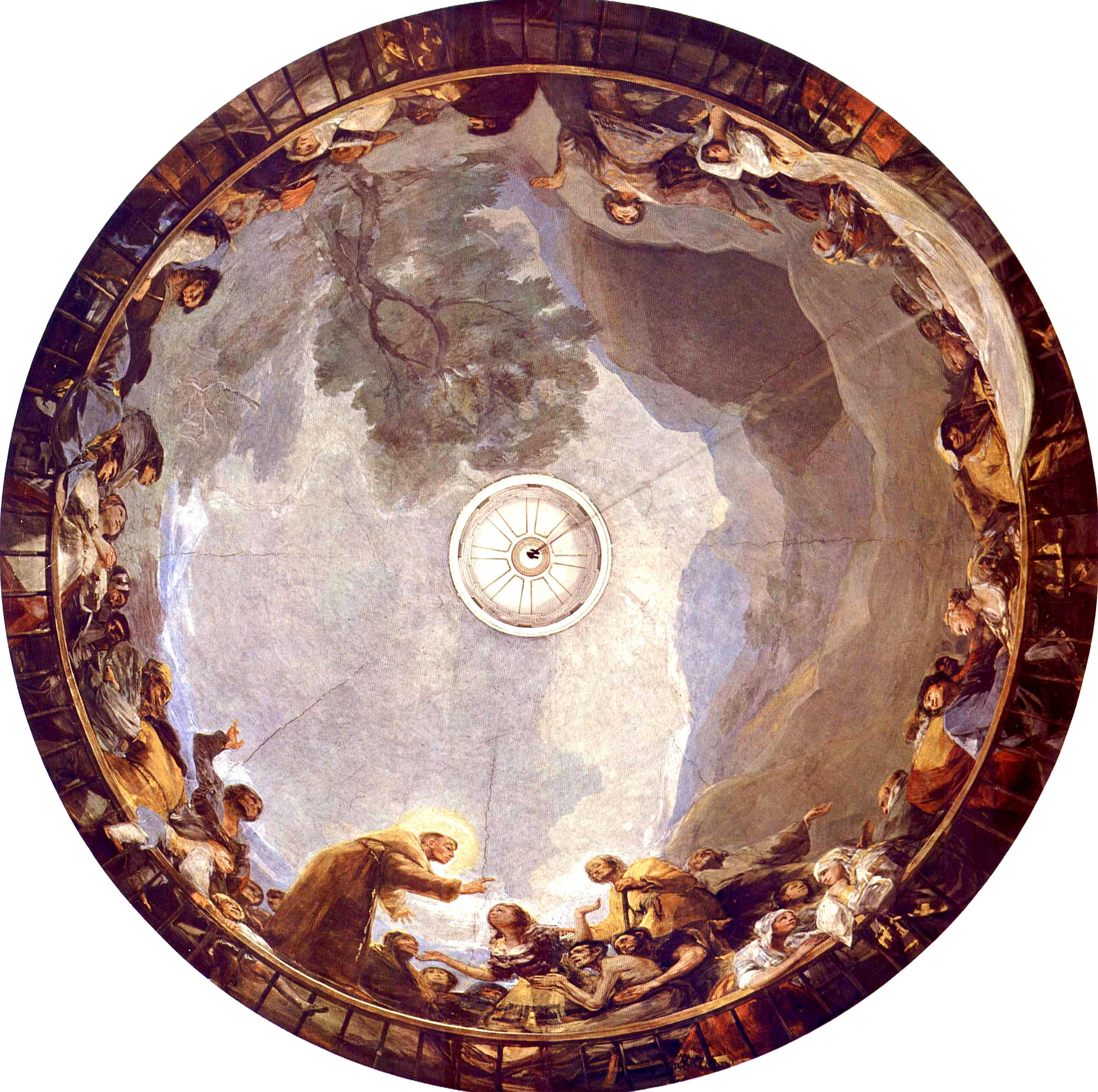 Kuppelfresko in San Antonio de la Florida, Madrid, Szene aus der Legende des Hl. Antonius von Padua: Der Heilige erweckt einen Toten in Lissabon, der die Unschuld seiner Eltern bezeugt, Gesamtansicht